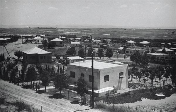 אבן יהודה - הישוב